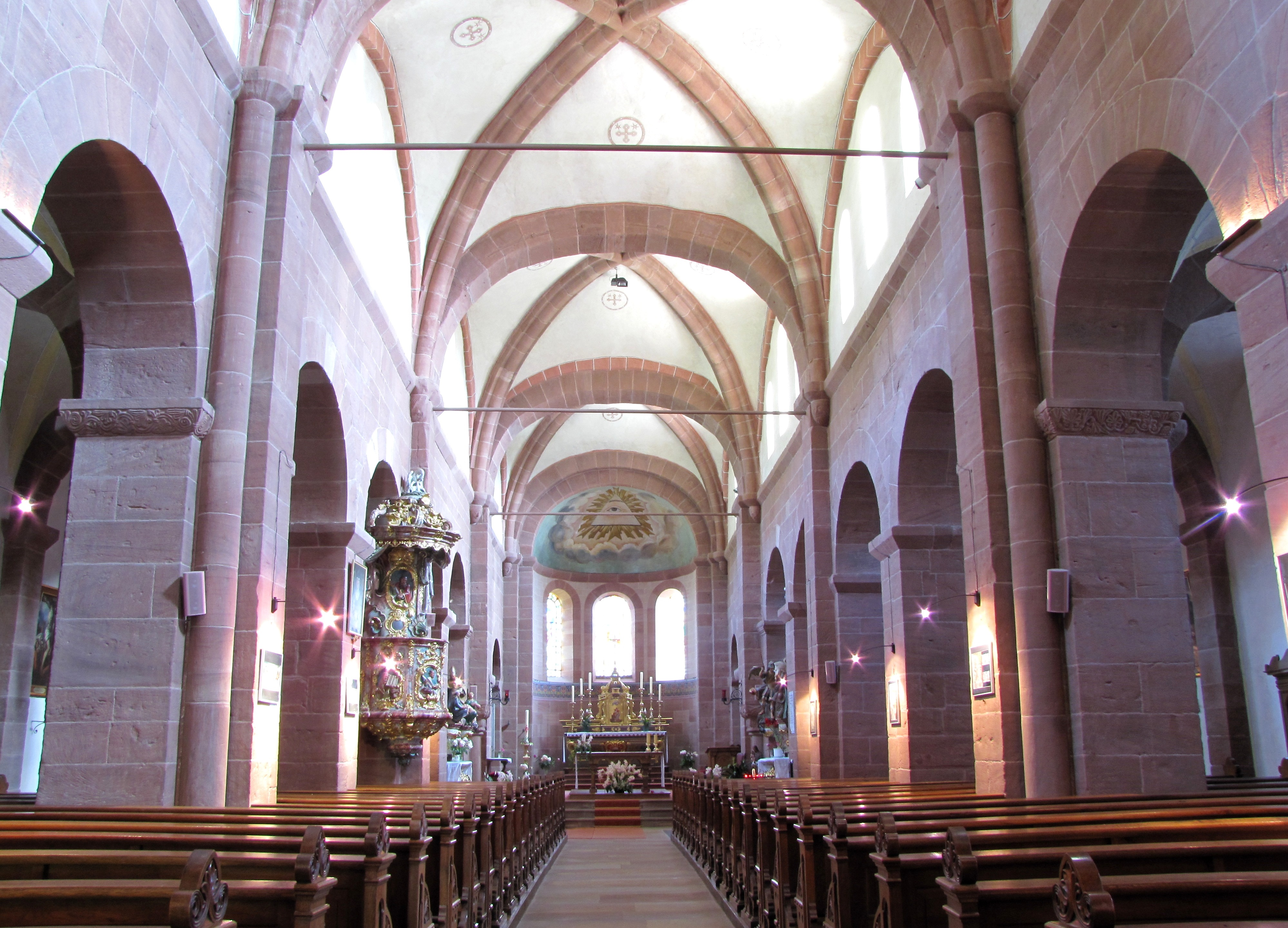 Alsace, Bas-Rhin, Saint-Jean-Saverne, Église abbatiale Saint-Jean-Baptiste (PA00084921, IA00055618): Vue intérieure de la nef vers le chœur.